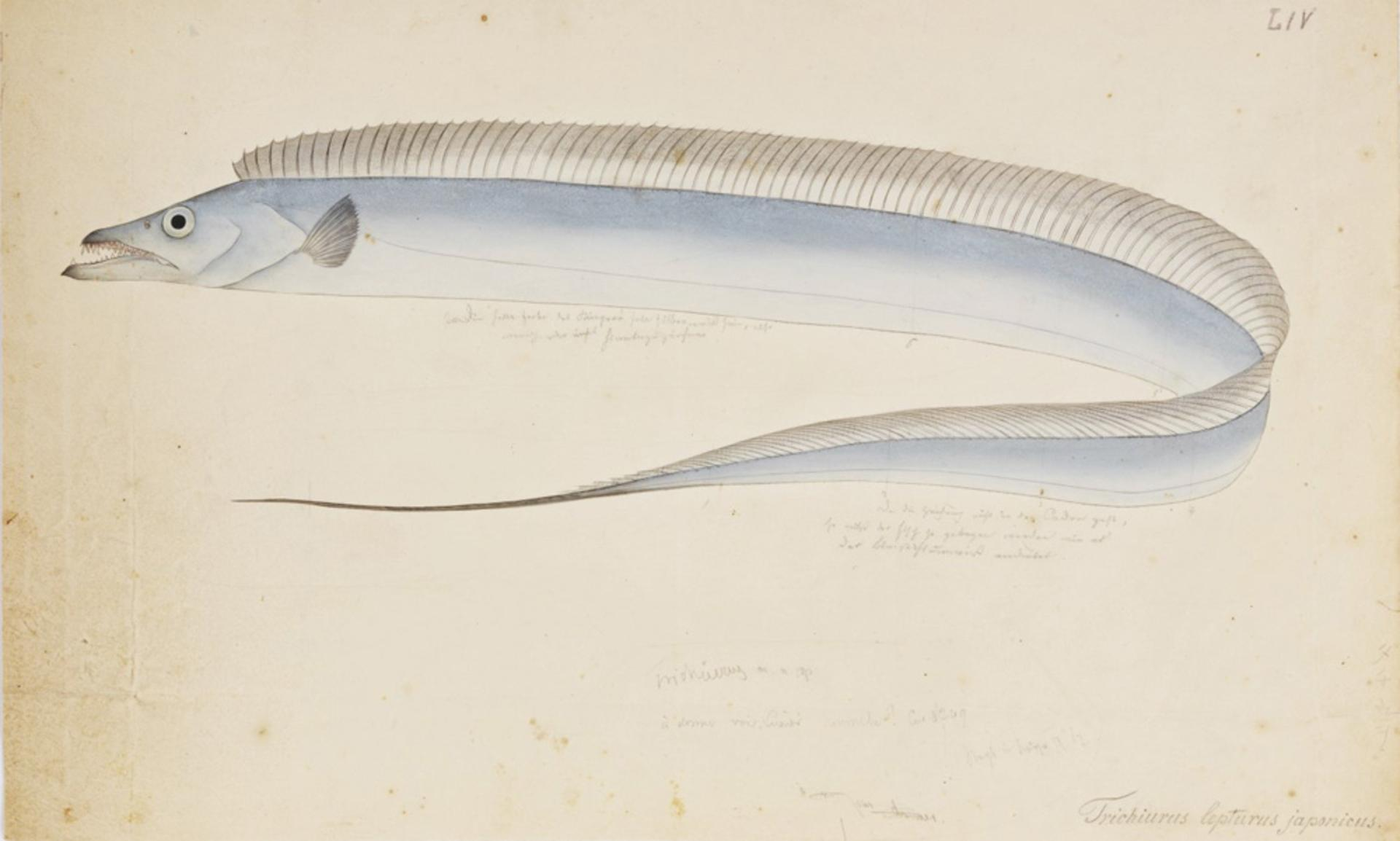 Trichiurus lepturus Linnaeus